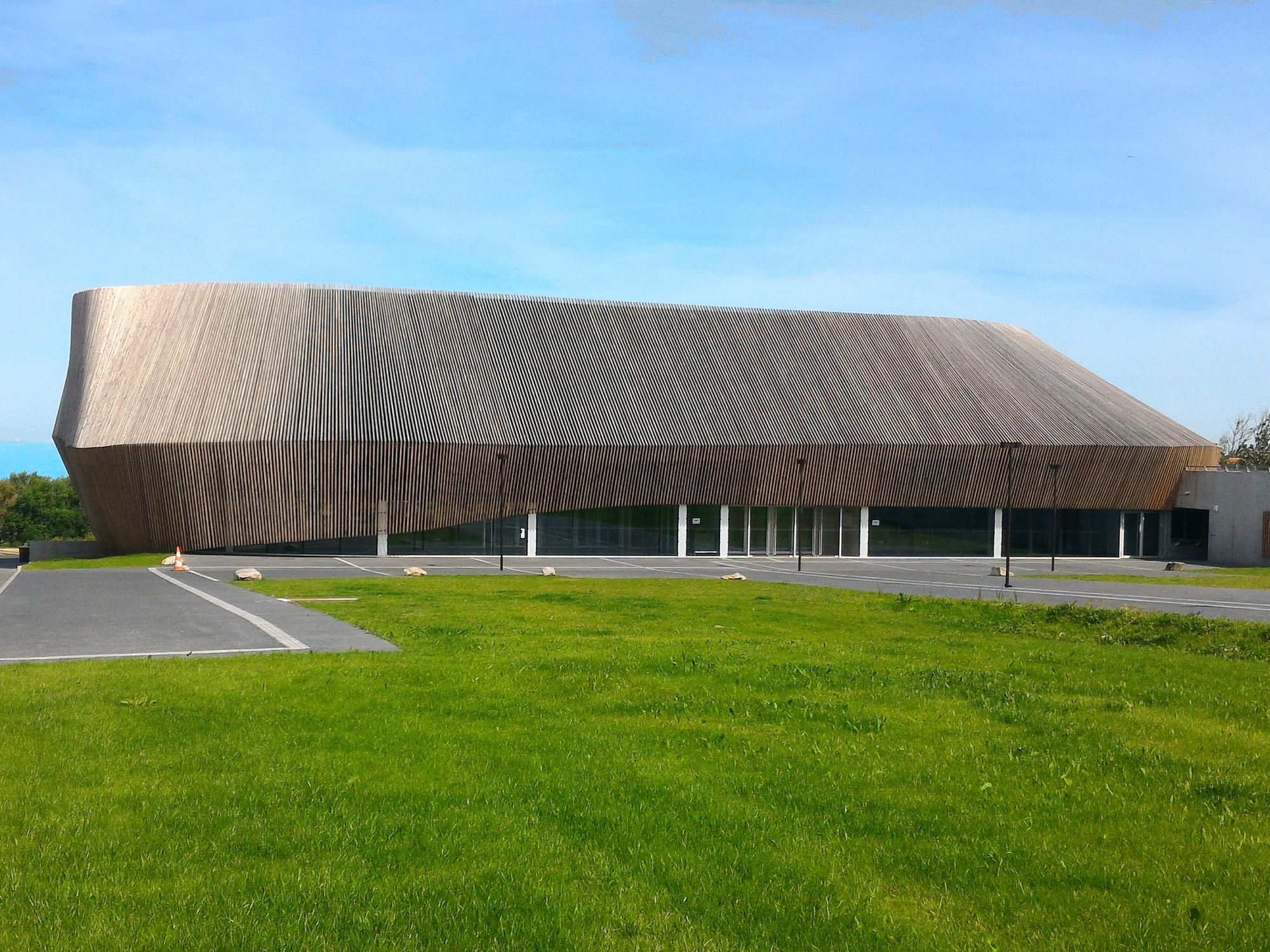 Le Chaudron, ville du Portel (62)